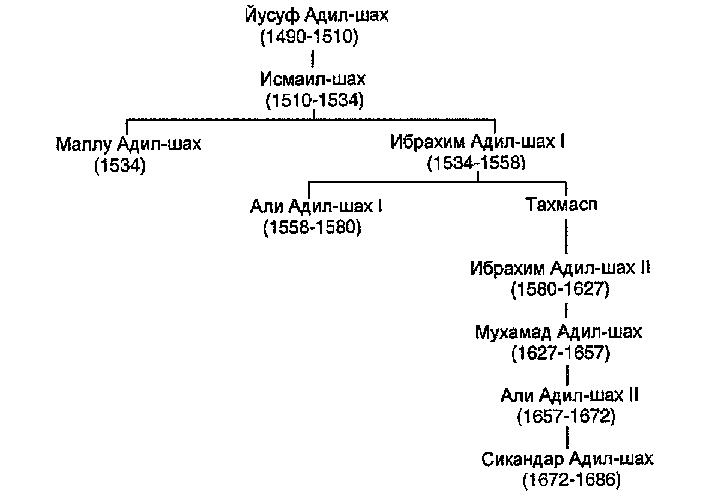 Дерево Династии Адил Шахов